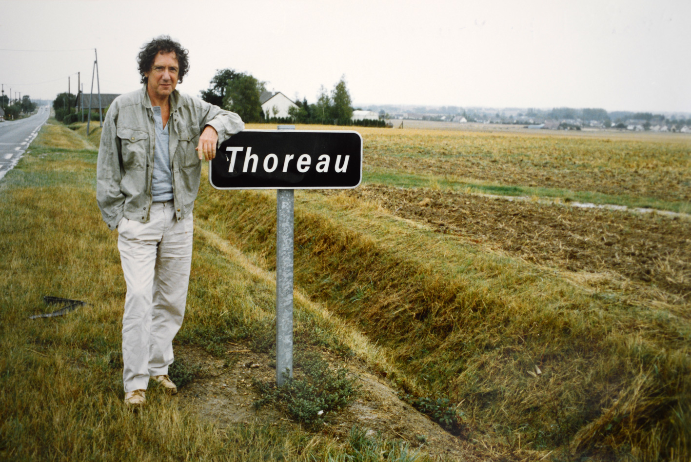 Marie-Claude White, Kenneth White en Beauce — Archives de l’auteur, 1991.